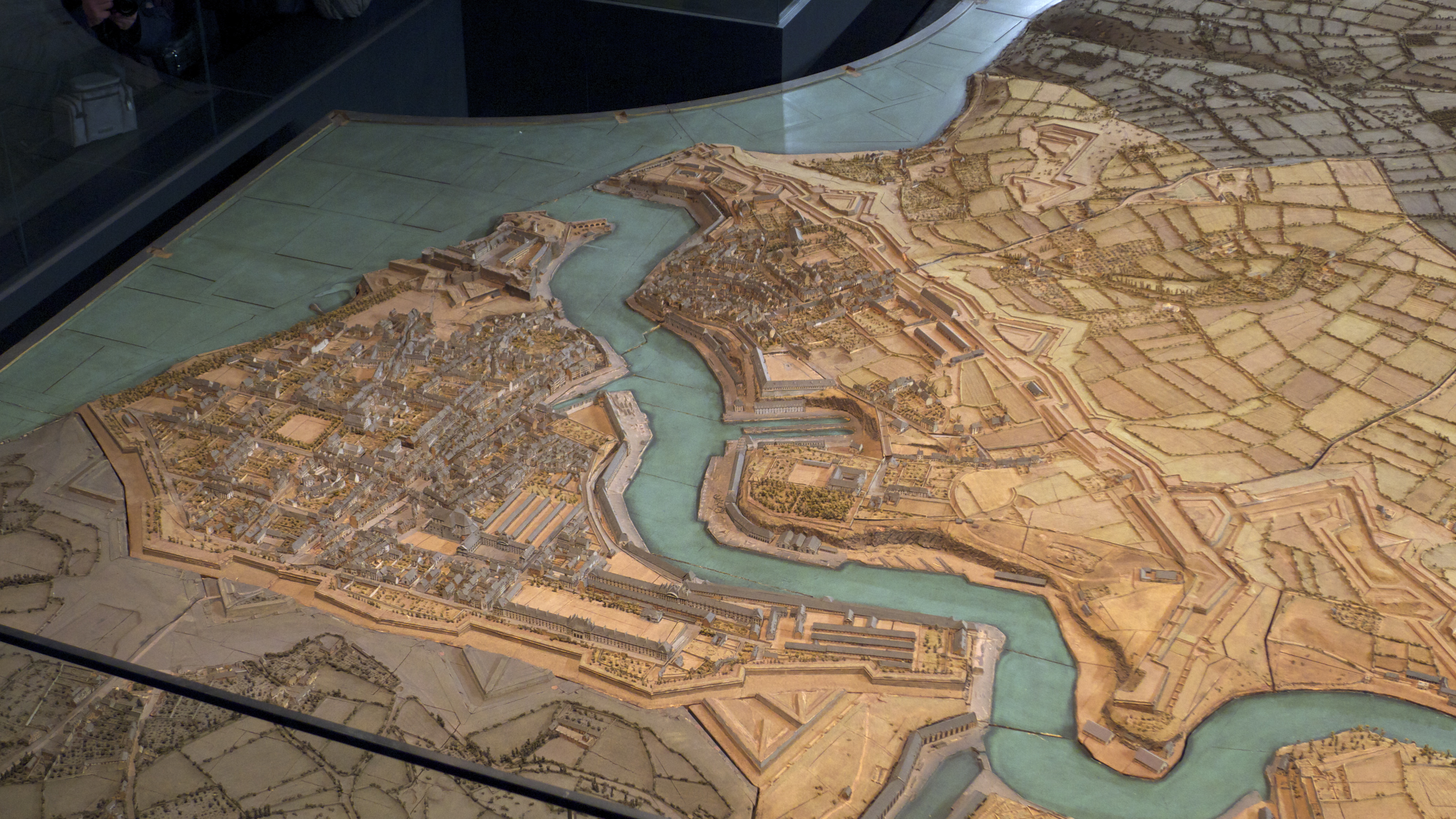 Détail du plan-relief du port de Brest : le port dans son état de 1811. Plan-relief construit de 1807 à 1811. Échelle 1/600e.